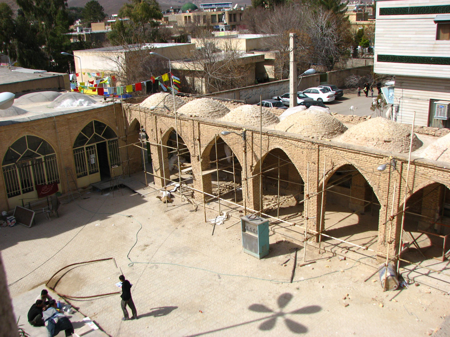 مسجد جامع ارسنجان يکي از مهمترين مساجد جامع استان فارس است که دردوره صفويه در نزديکي مدرسه سعديه ساخته شده است . مسجد جامع ارسنجان به شکل دو ايواني بنا شده است که شبستان مسجد با ايوان جنوبي از اهميت بيشتري برخوردار است. سردر اصلي مسجد در گوشه شمال غربي قرار دارد .در حال حاضر با ايجاد يک در ورودي در گوشه جنوب غربي مسجد نمازگزاران به مسجد وارد مي شوند. این بنا در سال 1387 مورد تعمیر و مرمت قرار گرفت. عکاس: غلام حسین زارع